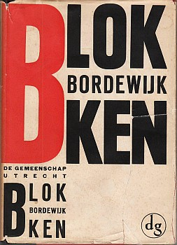 Stofomslag van de roman Blokken van de Nederlandse schrijver F. Bordewijk. Het ontwerp is in 1931 gemaakt door Andries Oosterbaan (1882-1935). De afkorting DG staat voor De Gemeenschap. Zie Lex van de Haterd: 'Van boekbinder tot grafisch vormgever'. In: Zacht Lawijd 3: 1 (2003)